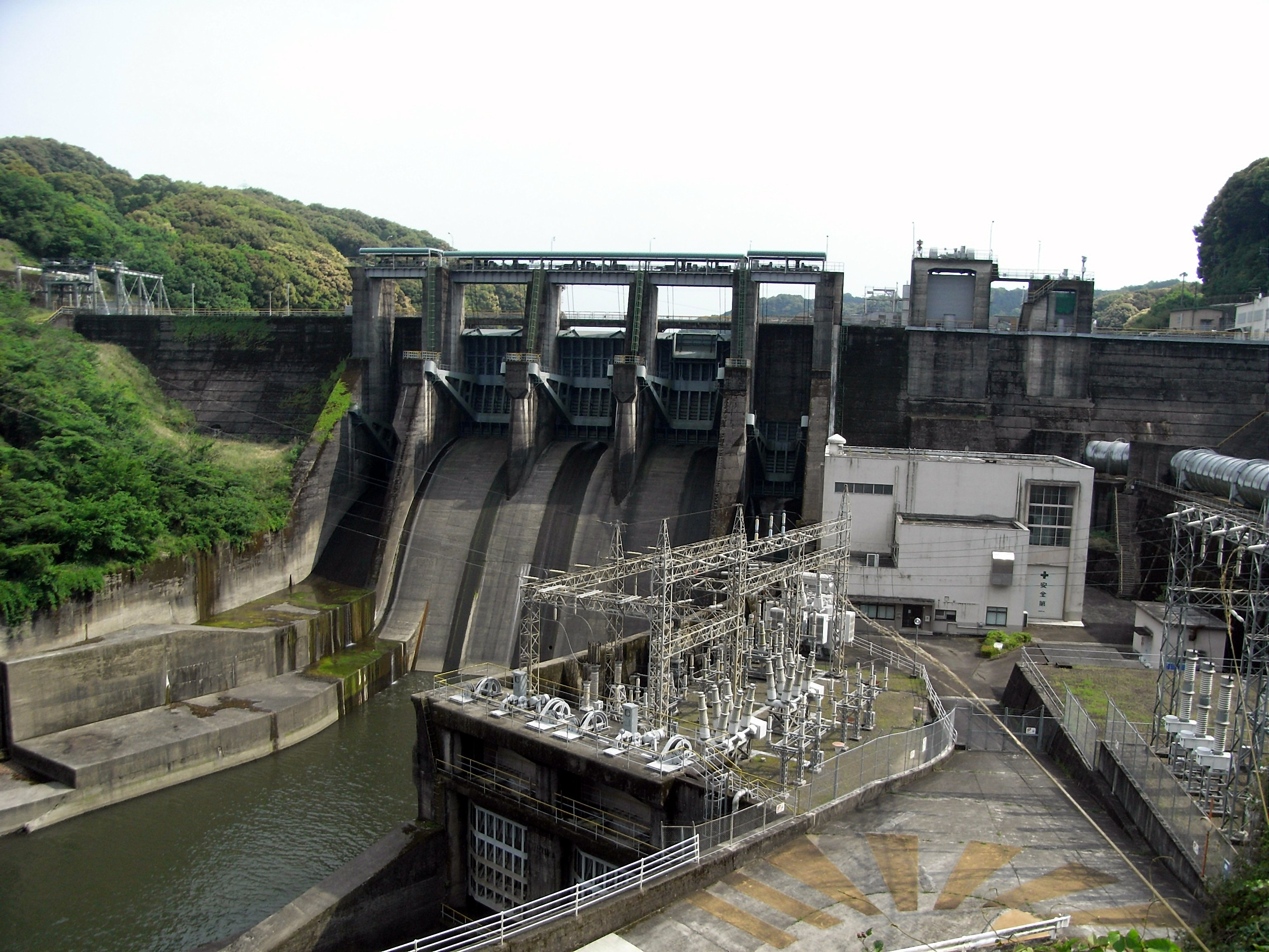 Dam